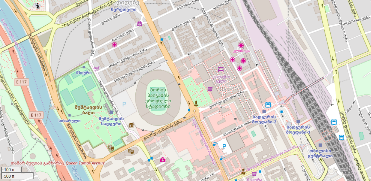 Kindereisenbahn Tiflis